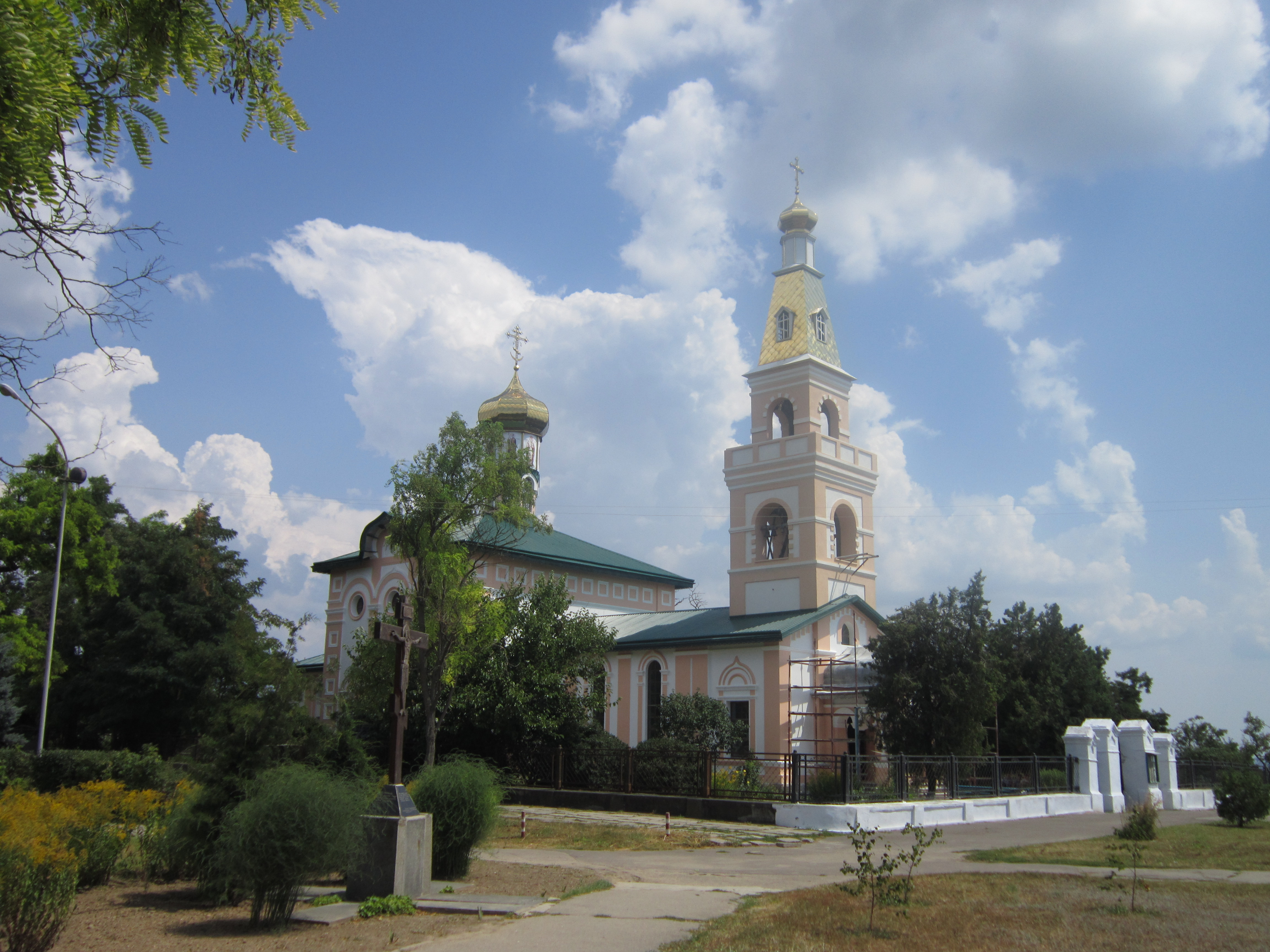 Миколаївська церква (мур.), Очаків, вул.Кірова,1